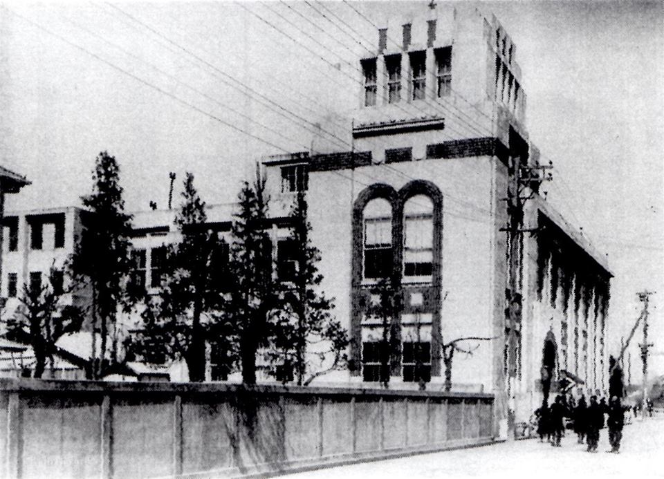 静岡県立葵文庫。静岡県立中央図書館の前身。1925年の開館当時。